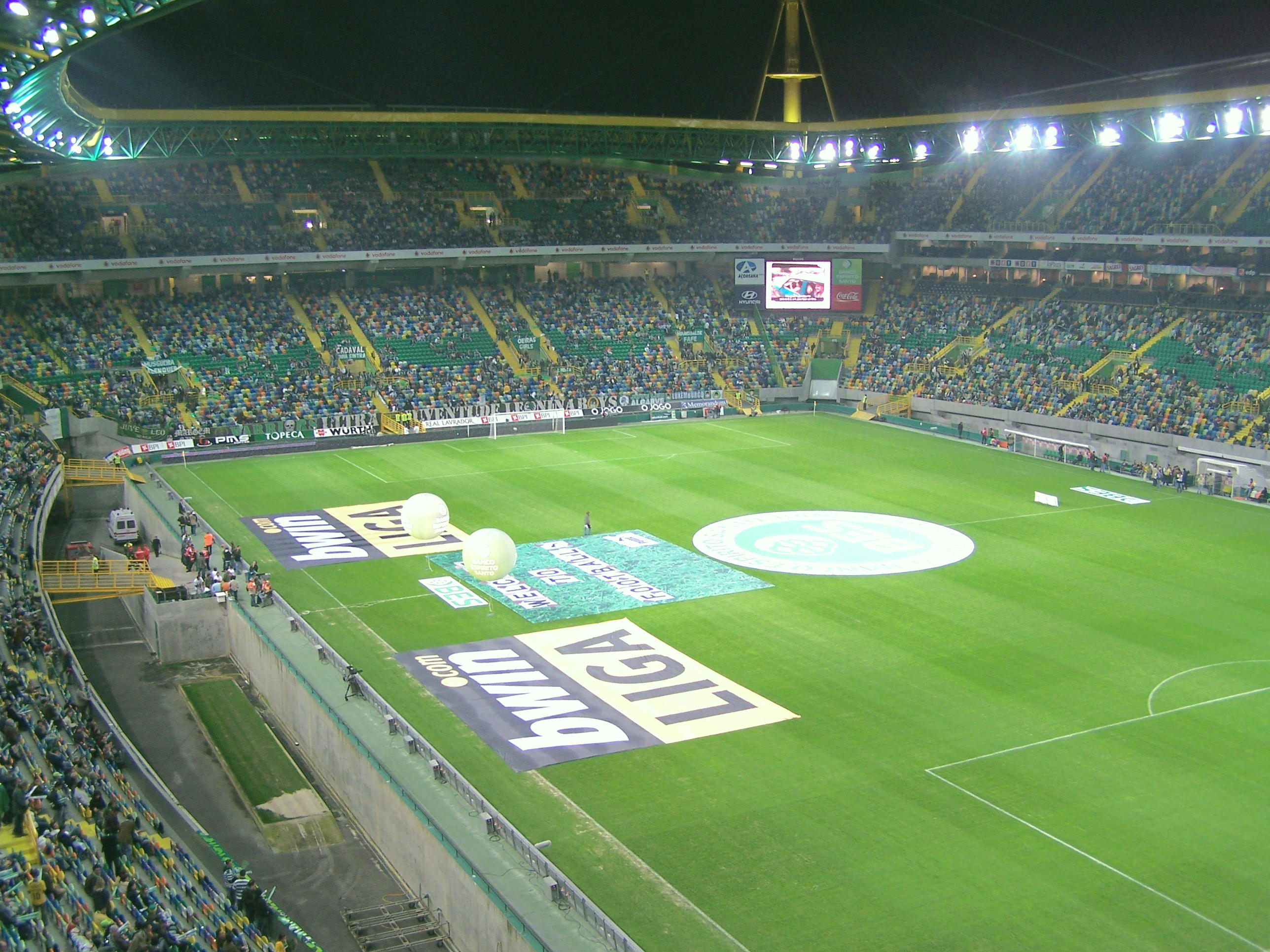 Local: Lisboa / Portugal Interior do Estádio do Sporting de Portugal Alvalade XXI Sporting_Clube_de_Portugal user:sacavem (pt) (usuário:sacavem)